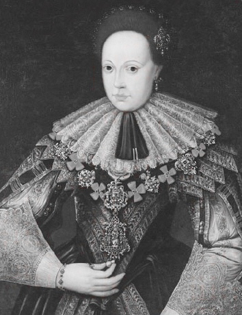 Elisabeth Sophie (1599-1627), prinsesse af Slesvig-Holsten-Gottorp, udsnit af maleri fra Gripsholm Slot